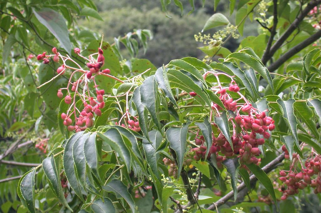 Euscaphis japonica：ゴンズイ 2002/08/07 和歌山県田辺市：Tanabe City. Wakayama Pref. Japan